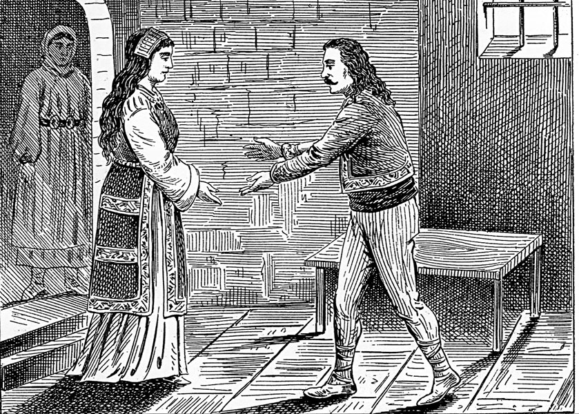 Књегиња Косара загледа краља Владимира у тамници (око 990). цртеж.